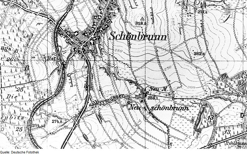 Original image description from the Deutsche Fotothek Bischofswerda-Schönbrunn. Meßtischblatt, 1:25000, Sekt. Bischofswerda, Nr. 4851 (RA Görlitz 30/38)